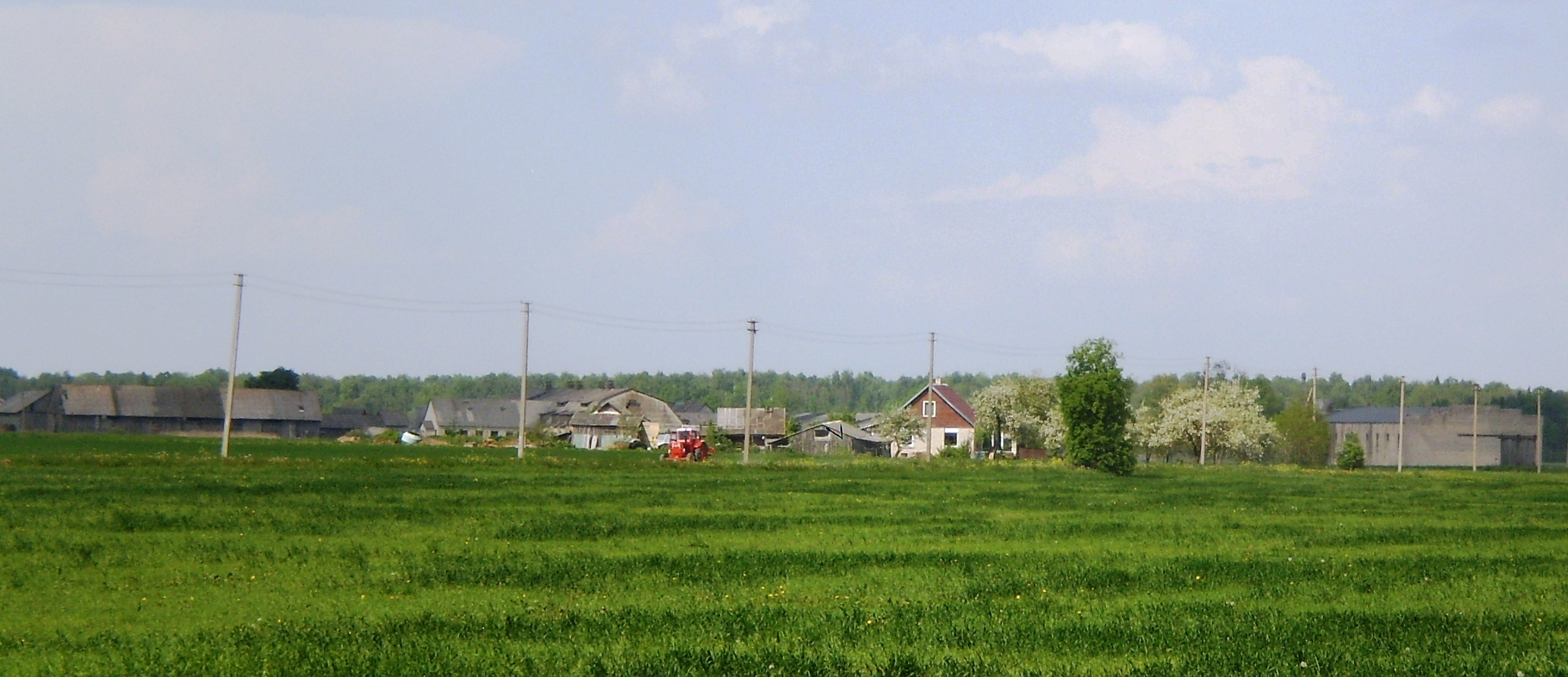 Puodžiai, Kėdainių raj.